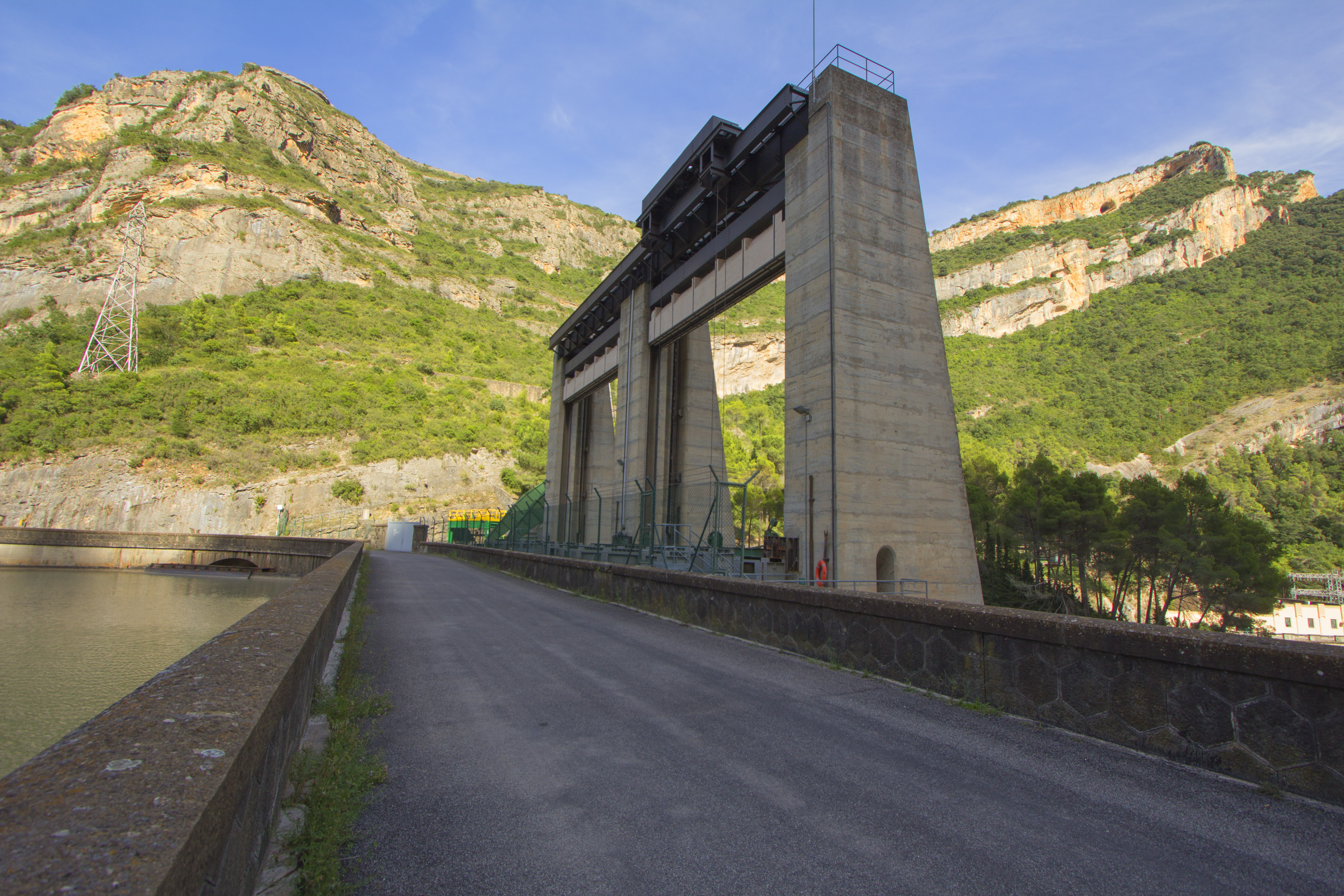 Presa de Terradets (Pallars Jussà)